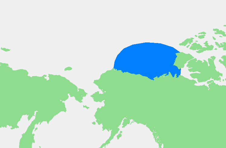 Beaufortzee / Beaufort Sea